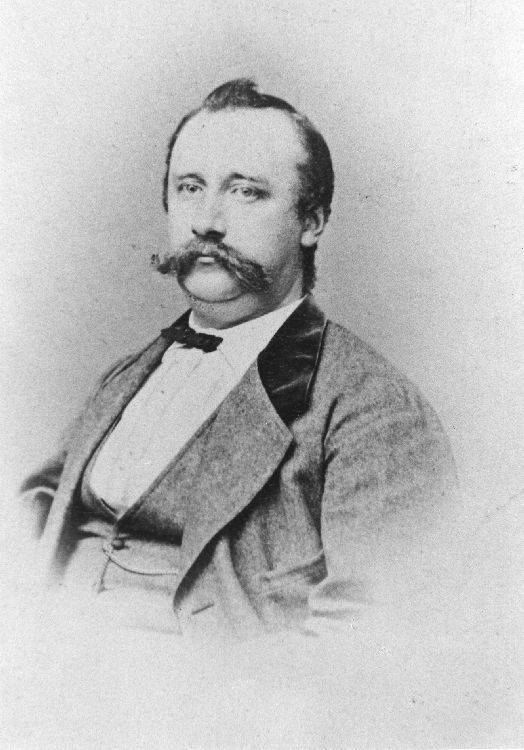 Portret fan Johan Winkler (1840-1916)